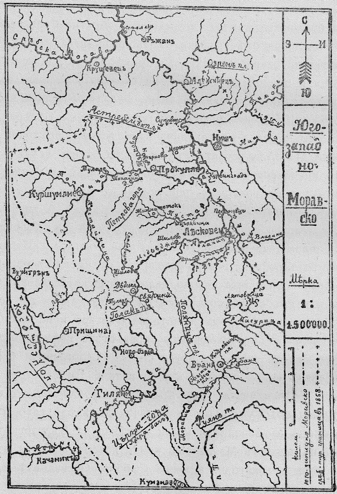 Граници на югозападно Моравско